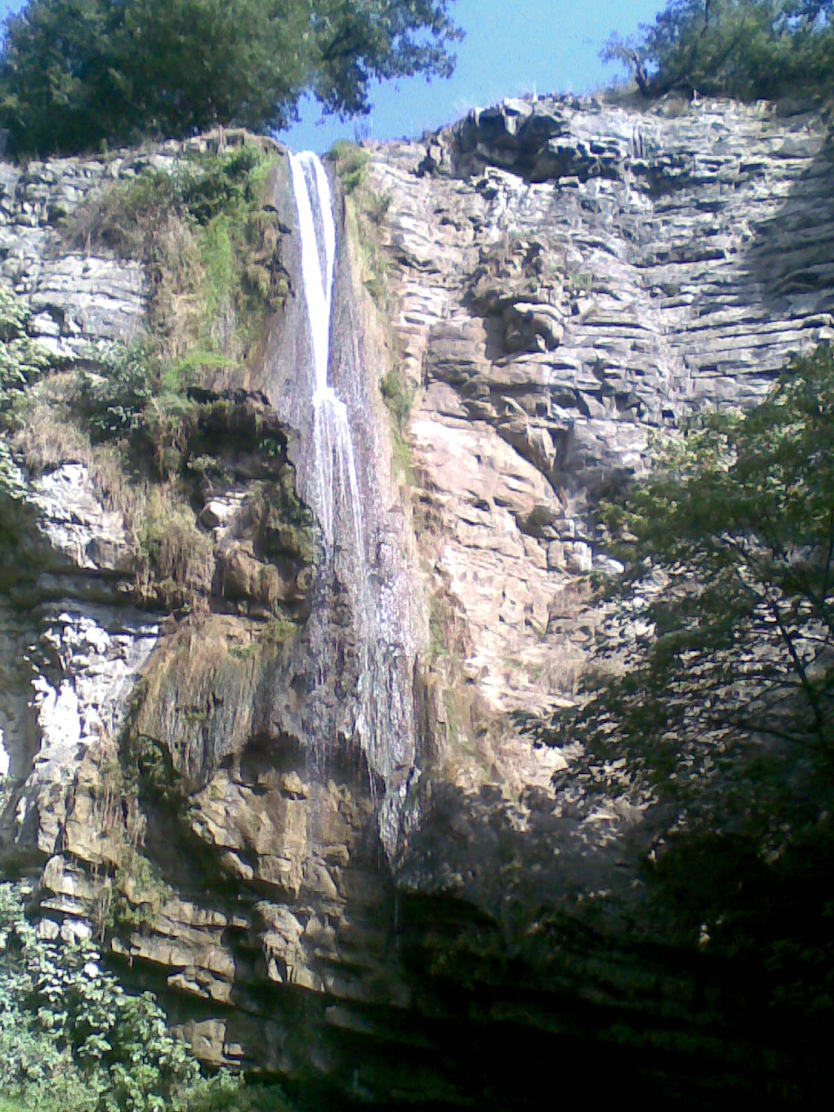 Yardımlı şəlaləsi